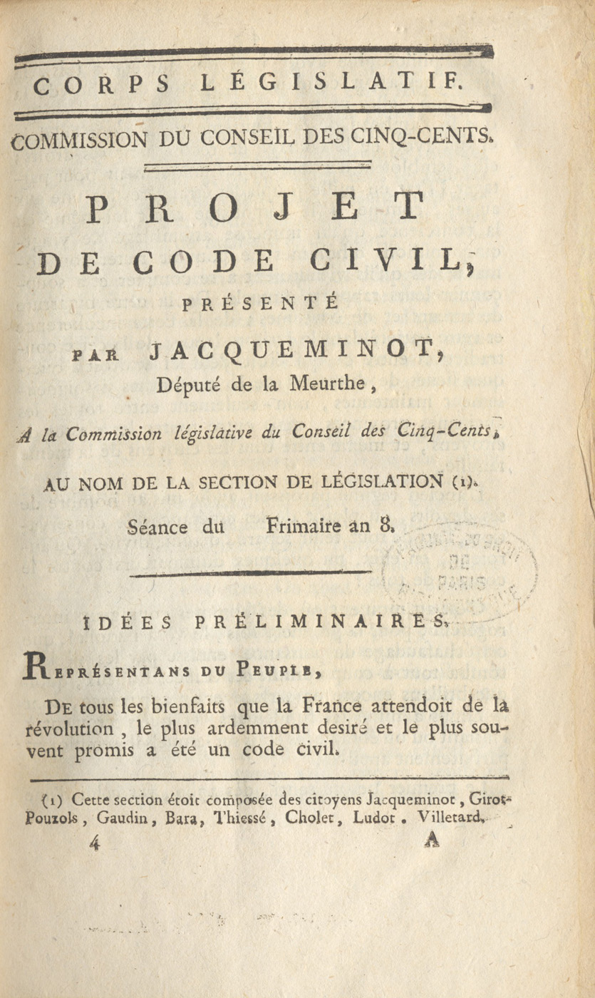 Projet de Code civil